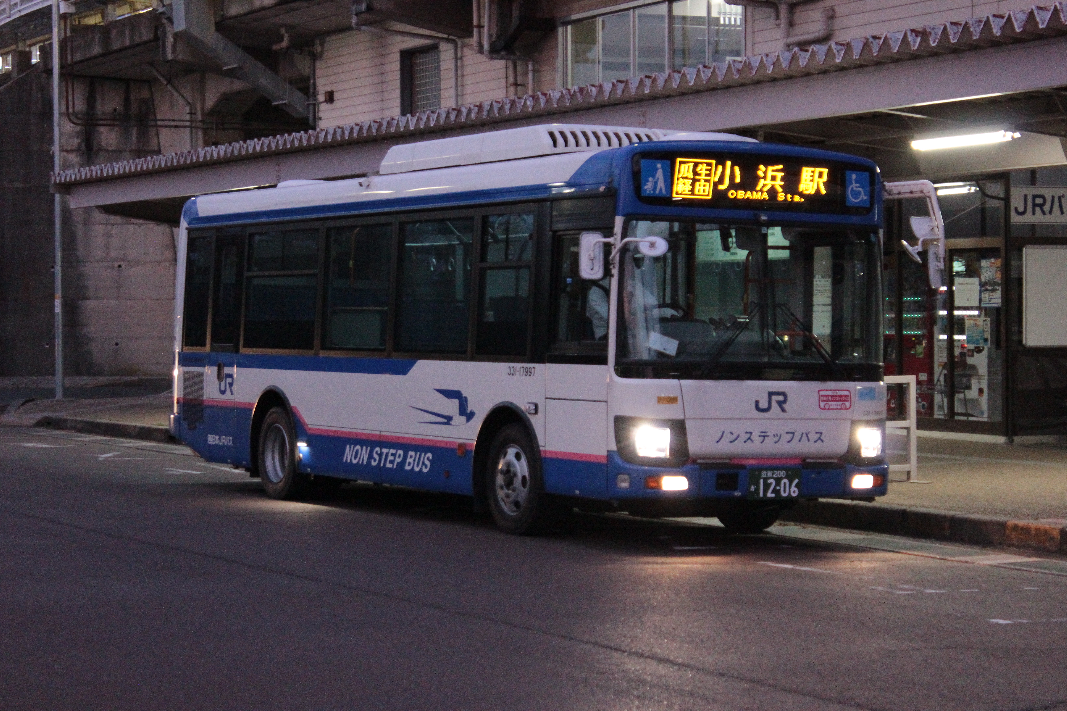 近江今津駅前に停車中の西日本ジェイアールバス「若江線」のバス。小浜駅行き。 Canon EOS Kiss X5